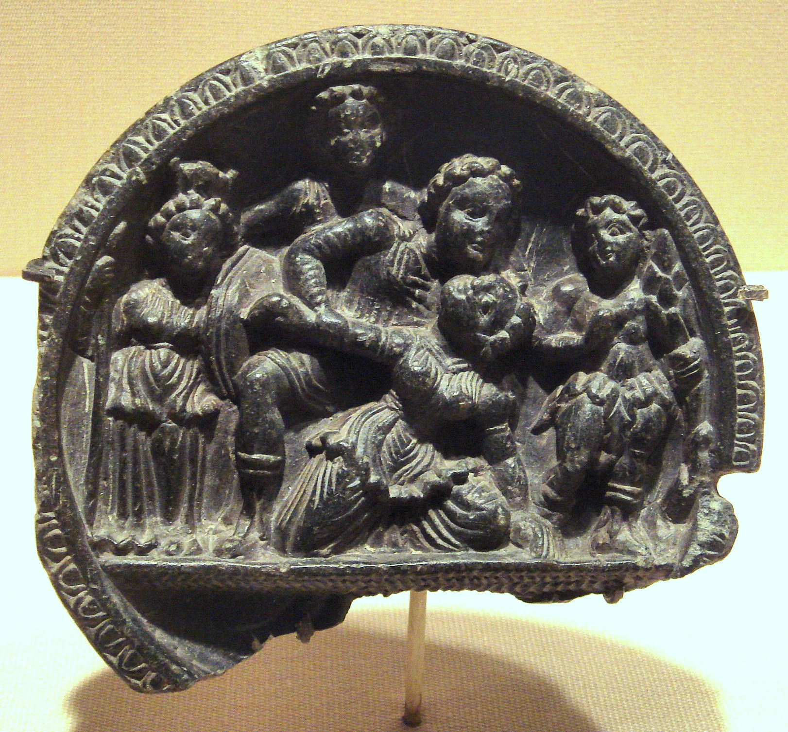 Indo-Greek stone palette.